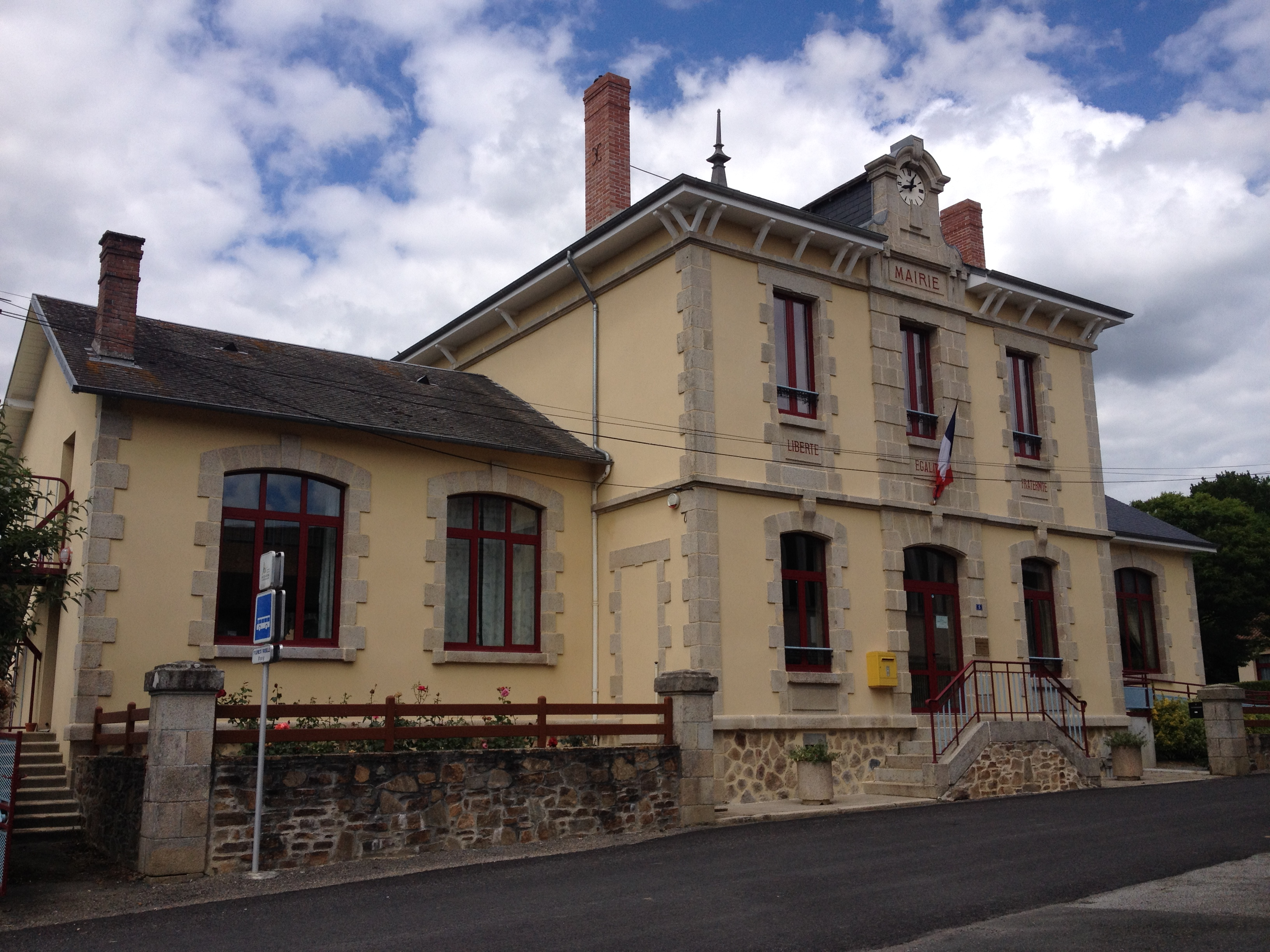 La façade de la mairie de Saint-Genest-sur-Roselle